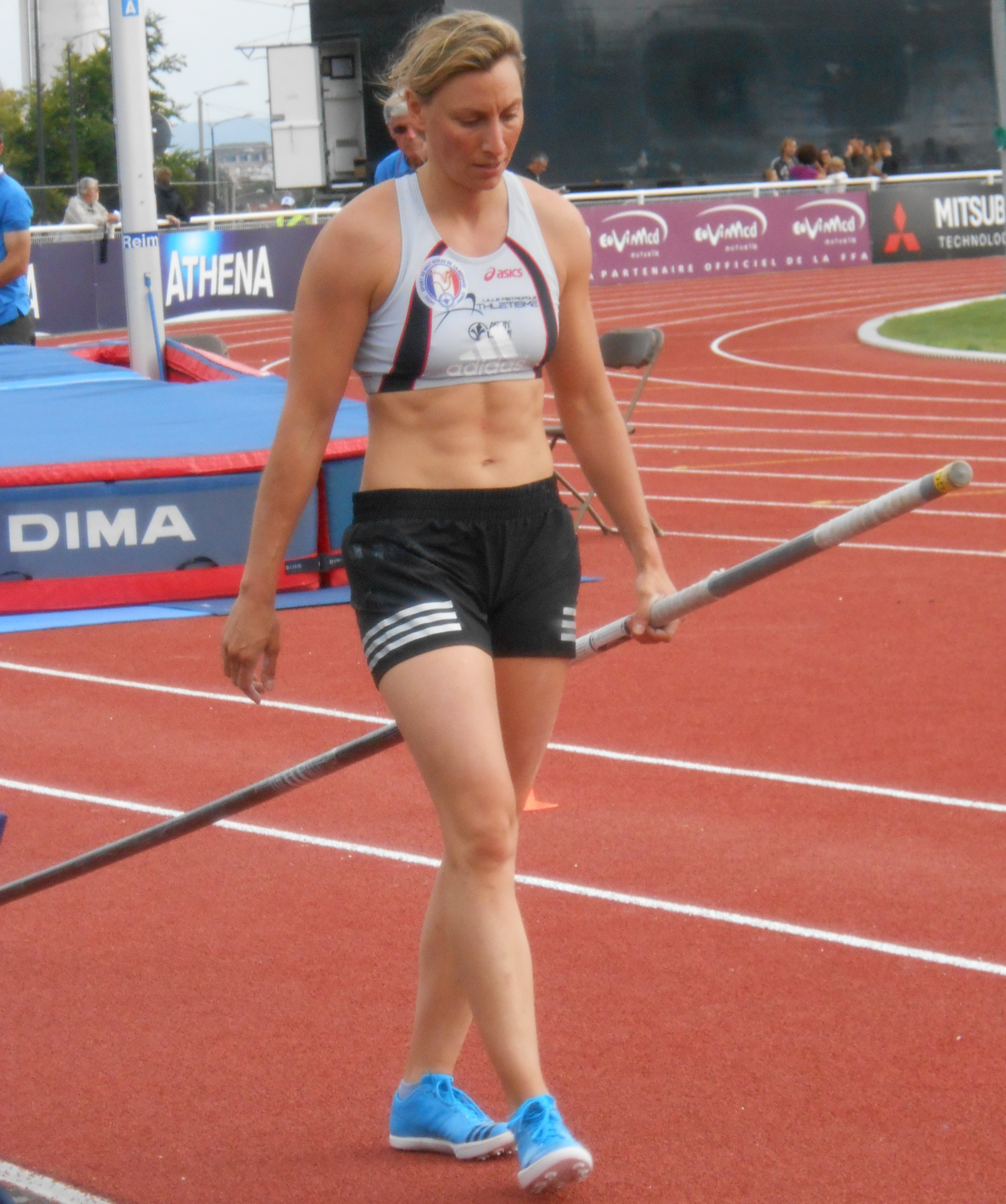 Vanessa Boslak lors des championnats de France d'athlétisme 2014 à Reims.